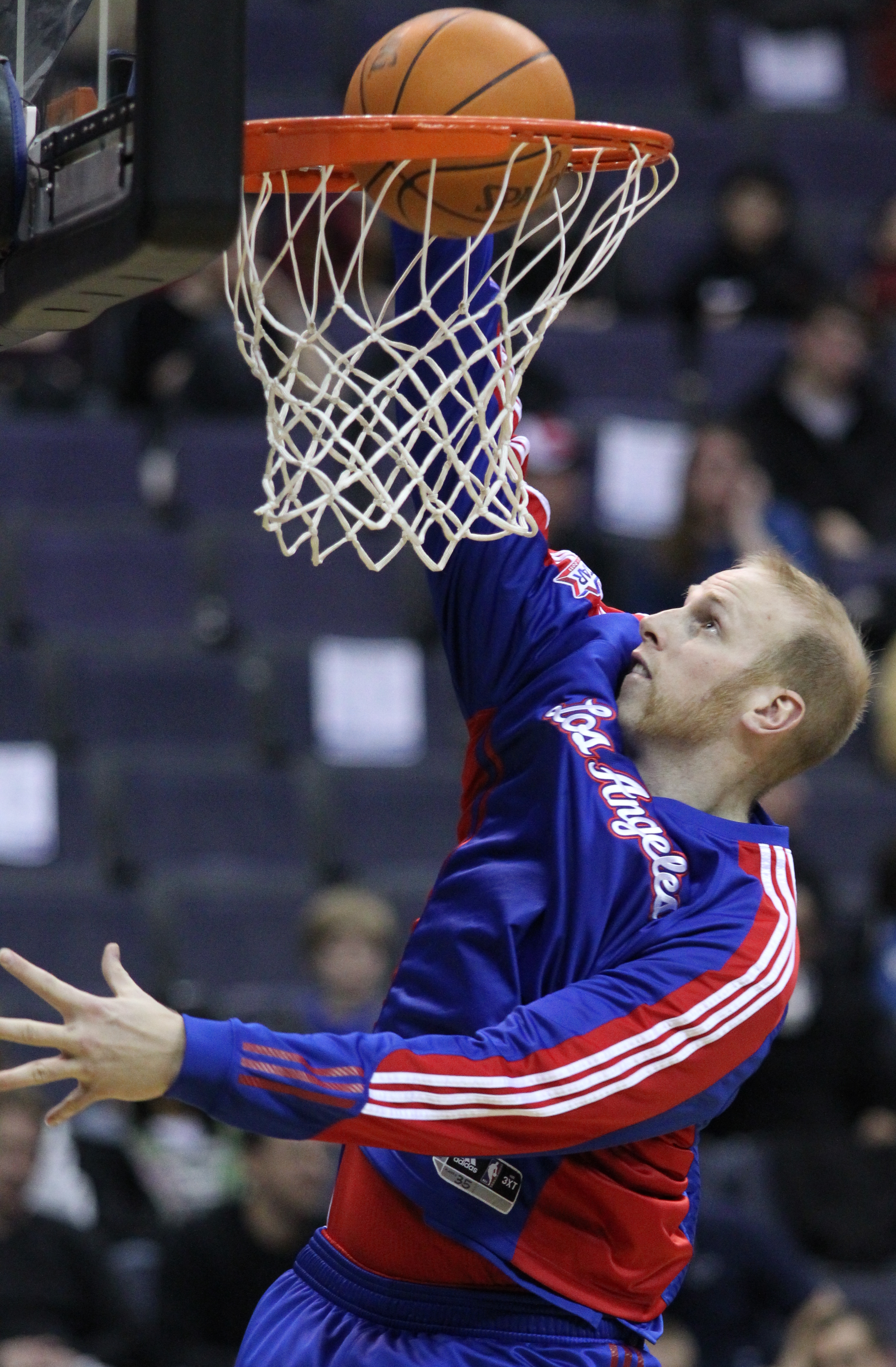 Wizards v/s Clippers 03/12/11